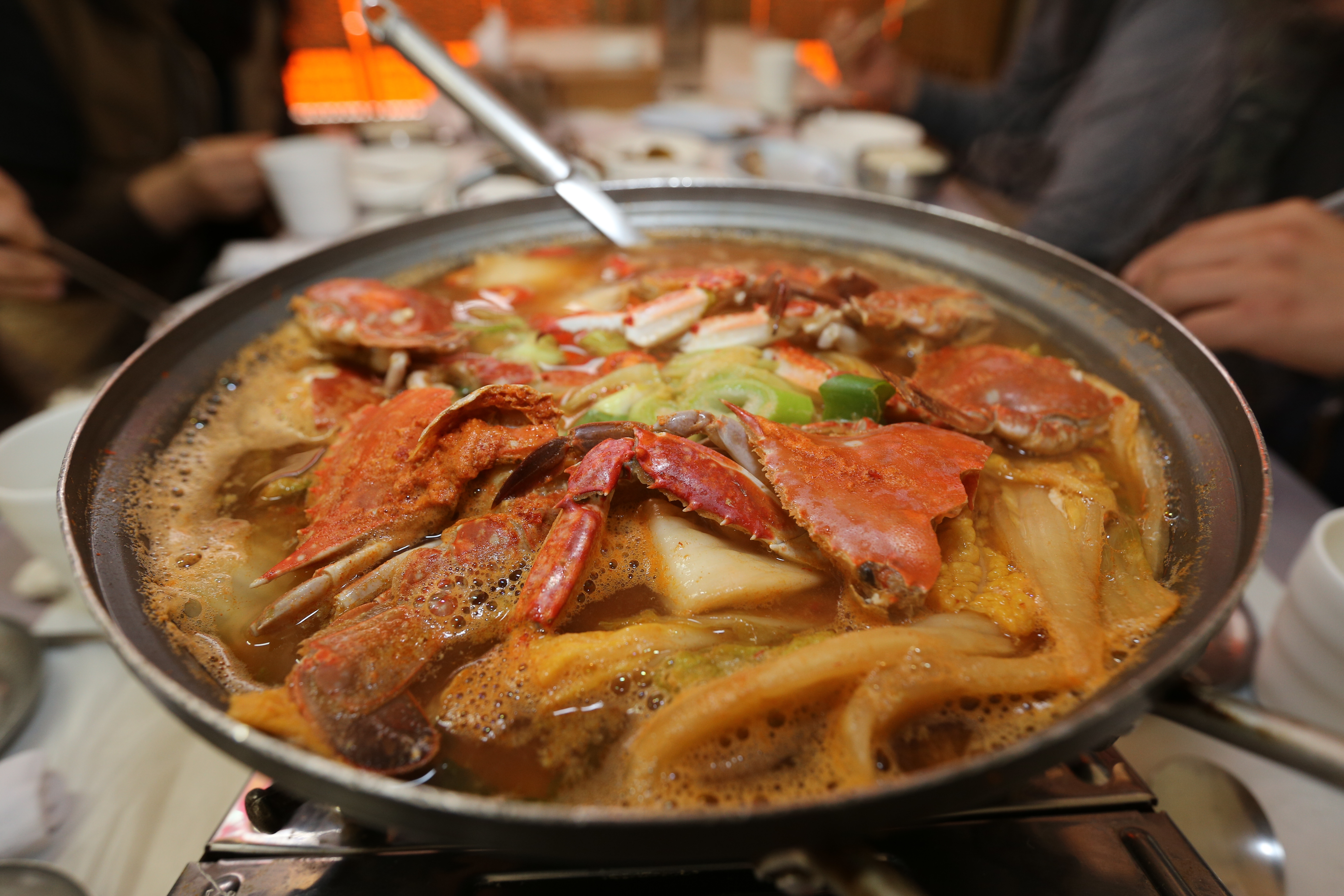 조선말: 서산의 게국지